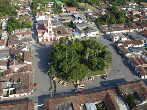 Panoramica Andalucía